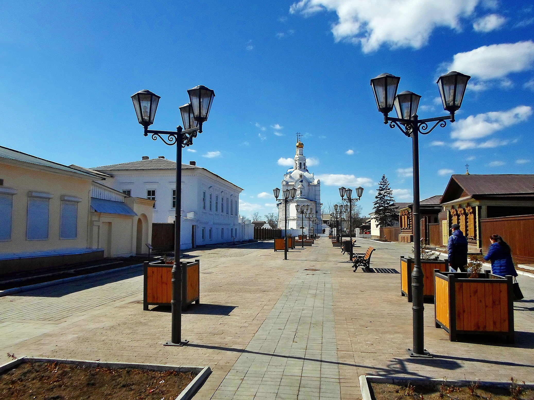 Улан-Удэ. Улица Соборная. Апрель 2017 года.